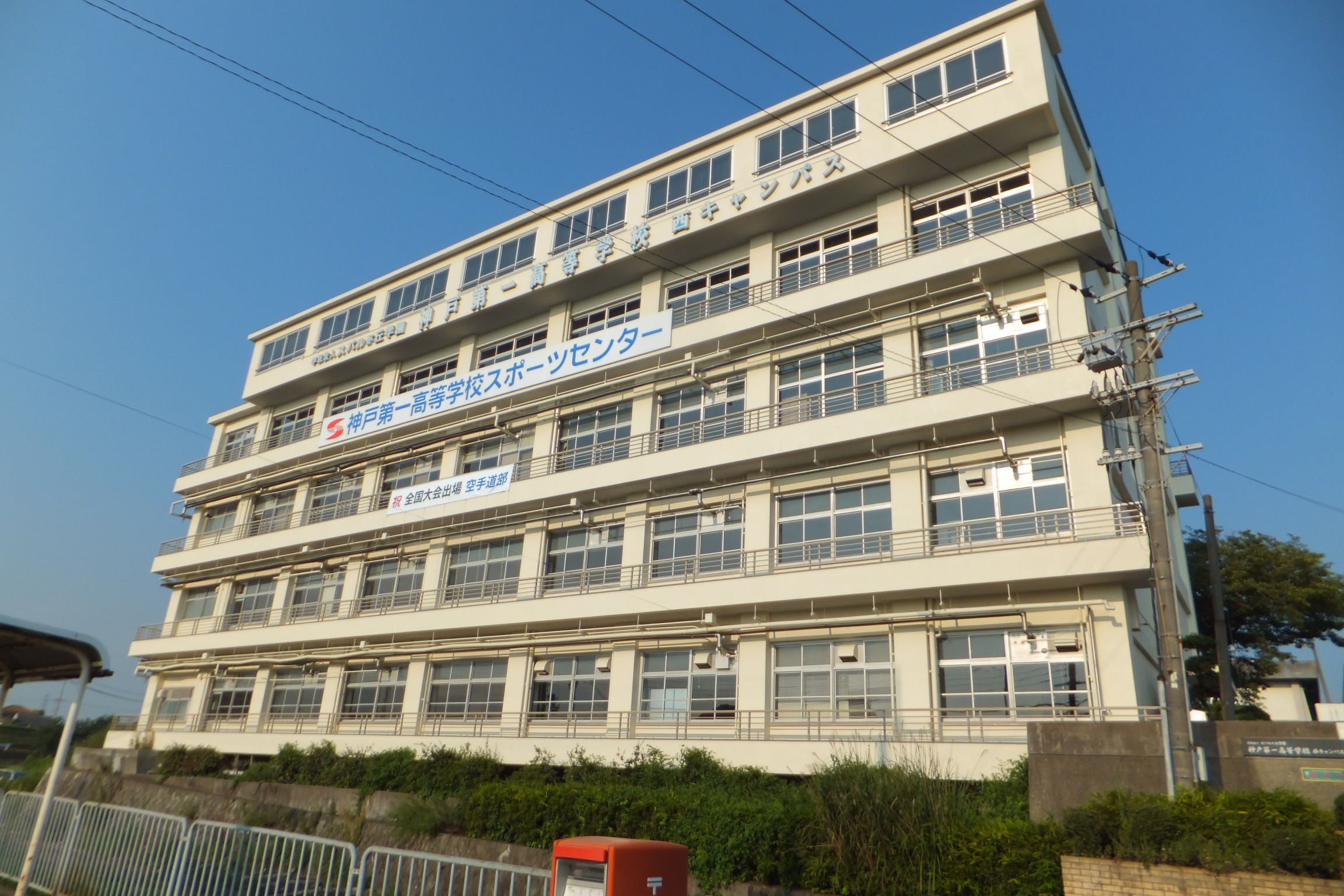 神戸第一高等学校西キャンパス